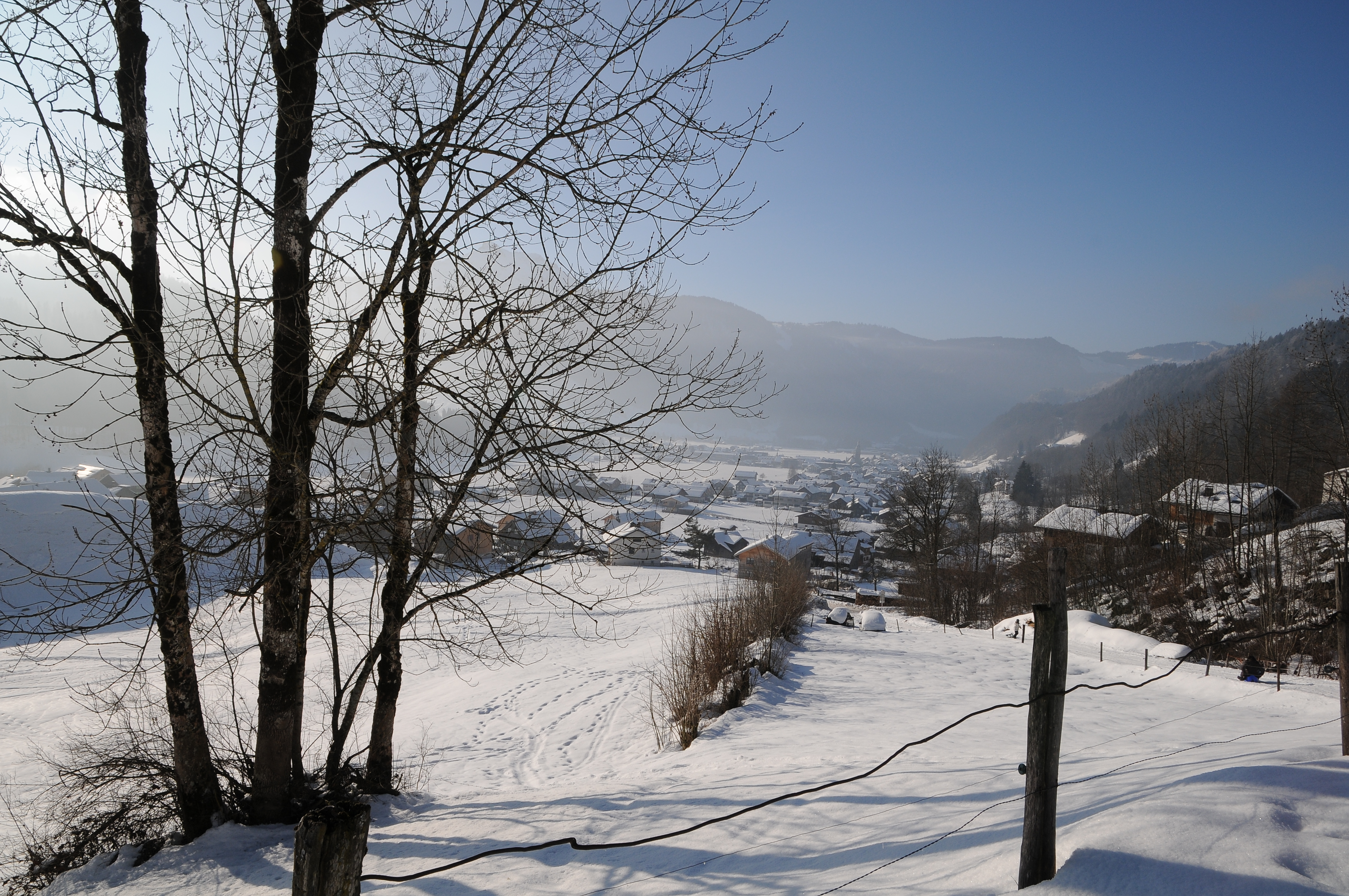 Blick von der Halde ins Kirchdorf von Bezau.